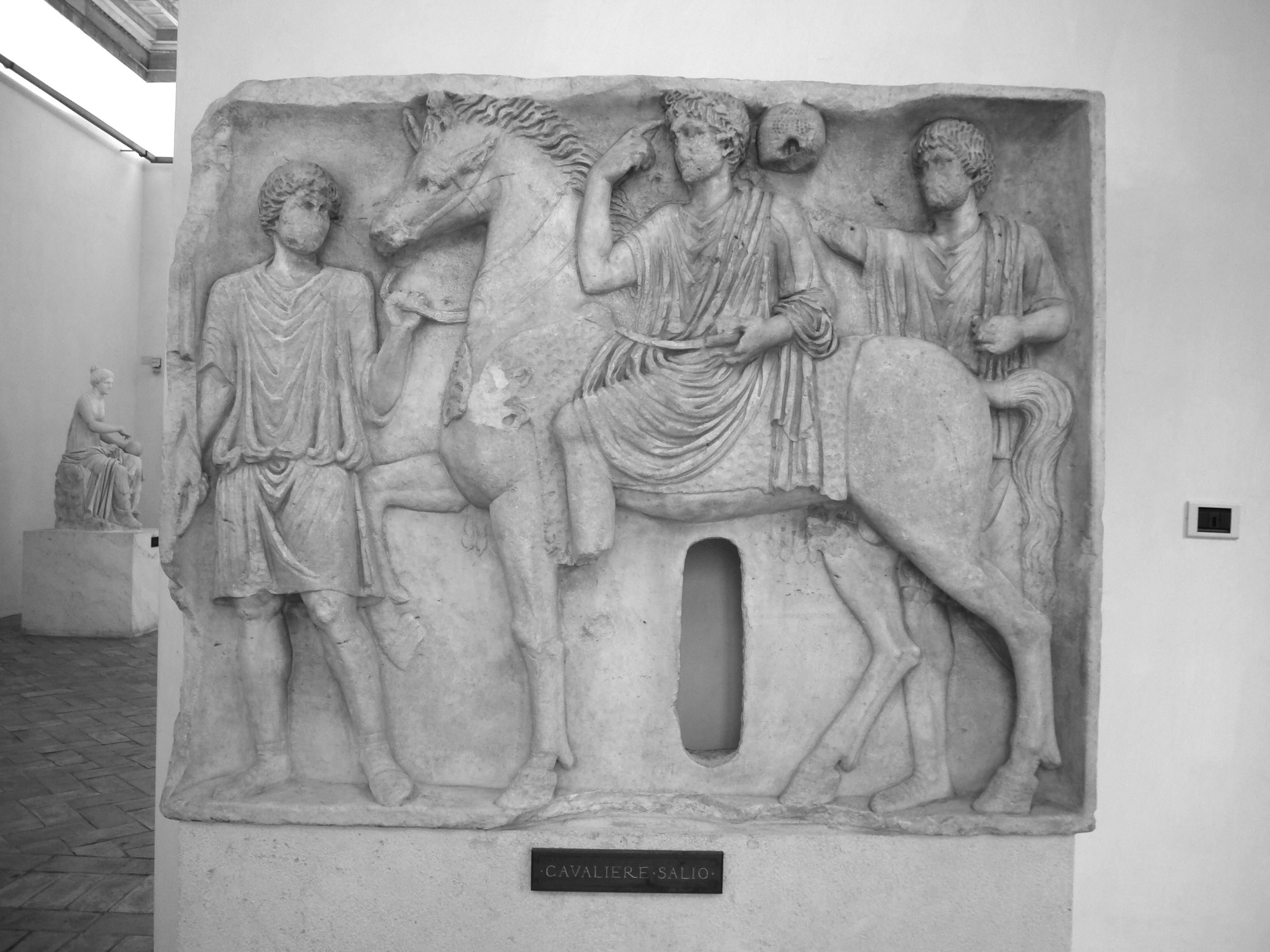 Relief des Saliens, un collège de prêtres romains consacrés au culte de Mars.